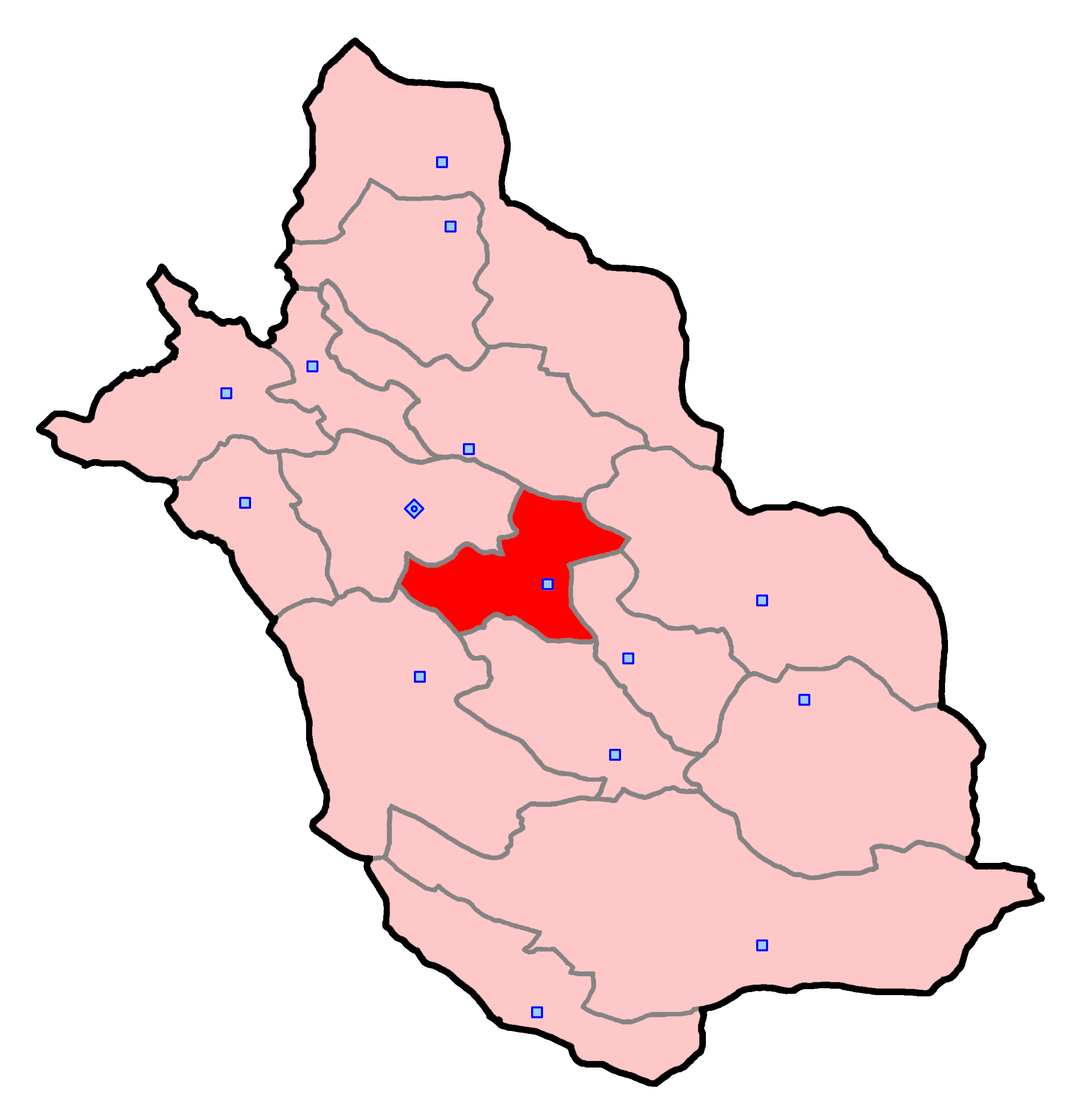 حوزهٔ انتخاباتی سروستان و کوار و کربال برای انتخابات مجلس شورای اسلامی